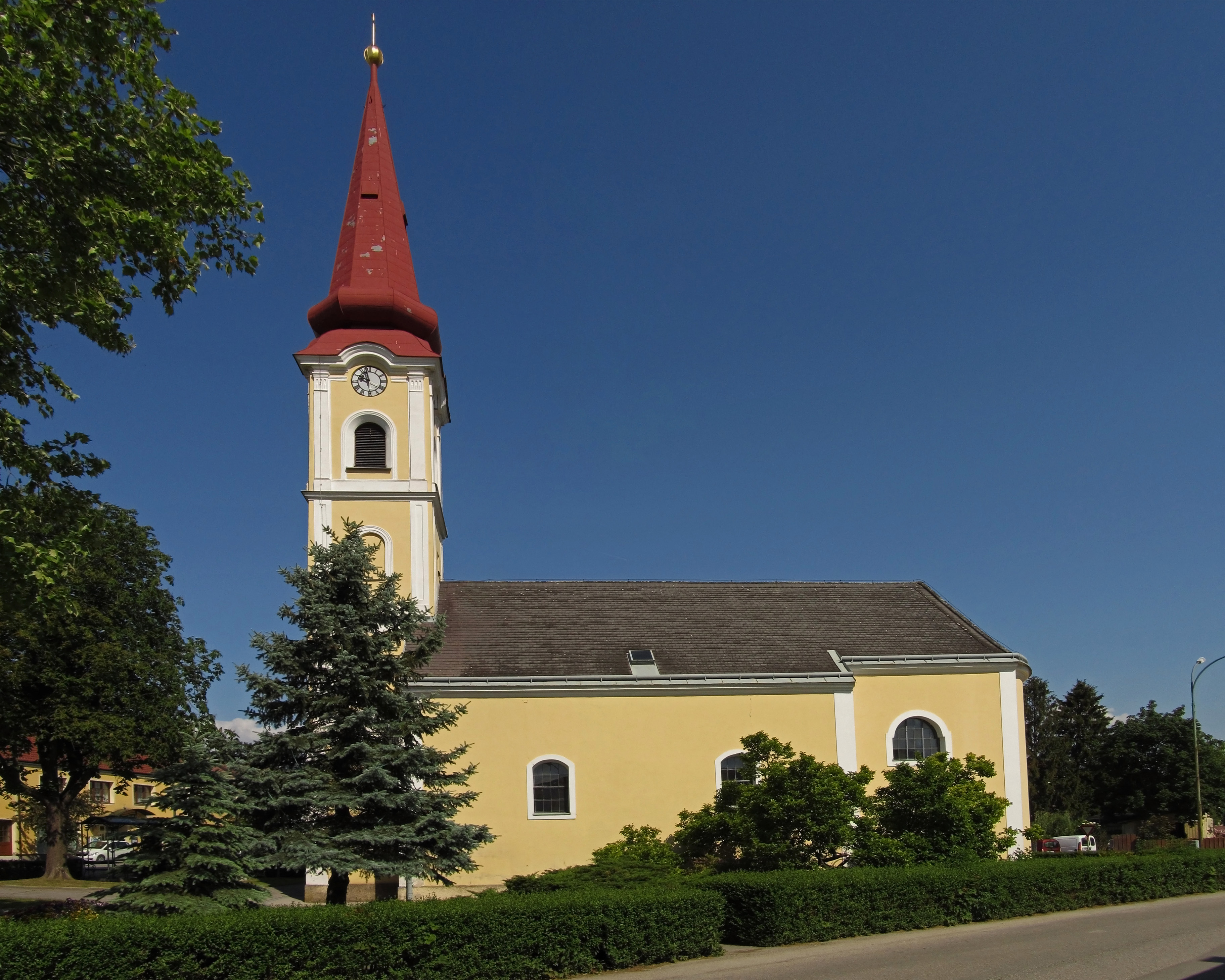 Kath. Pfarrkirche hl. Rochus in Ollern